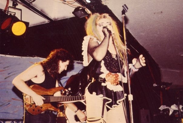 1979: Ein Club 2-Auftritt von Nina Hagen sorgt in Österreich für einen Fernsehskandal.